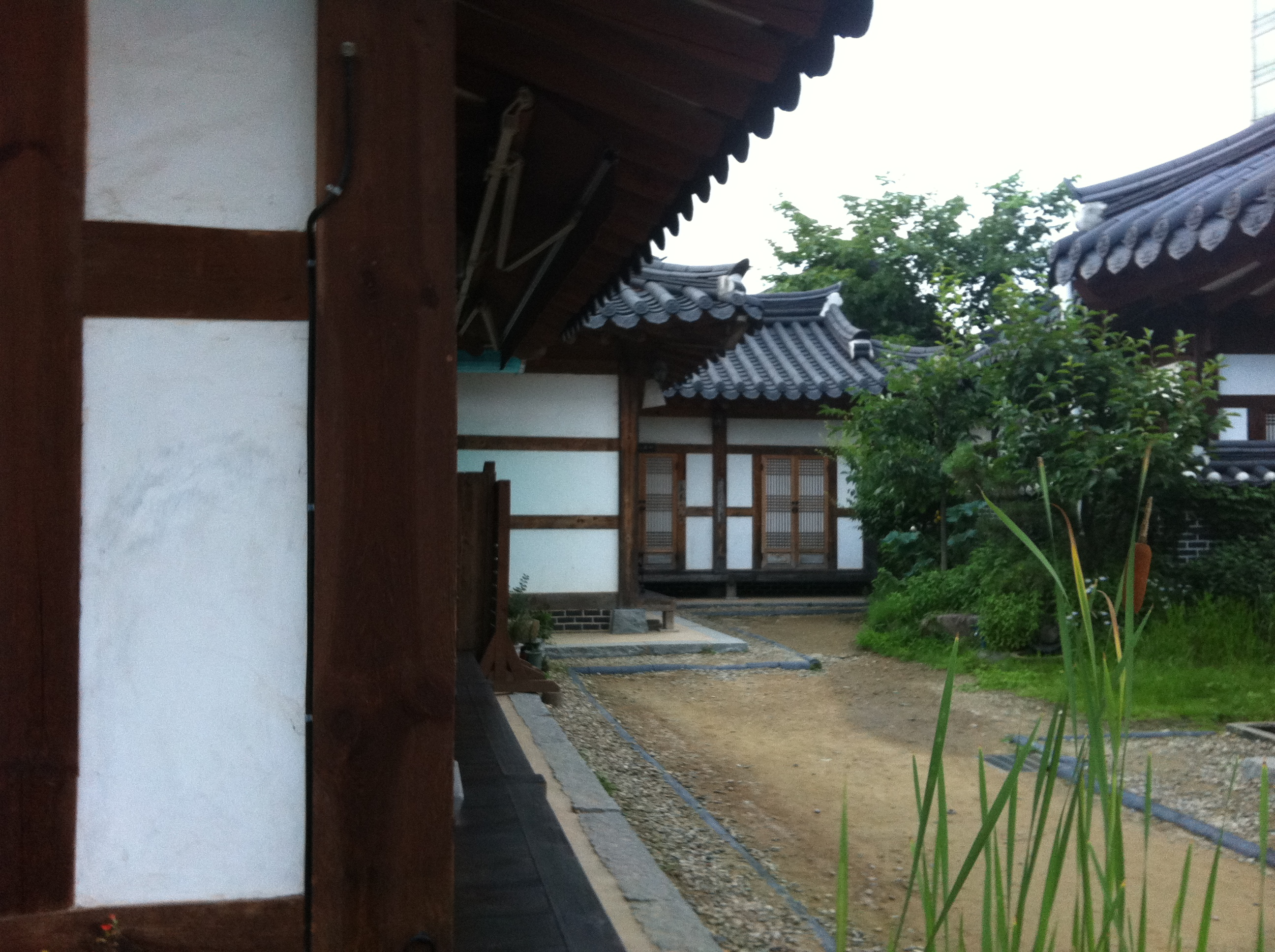 전주한옥마을의 풍경